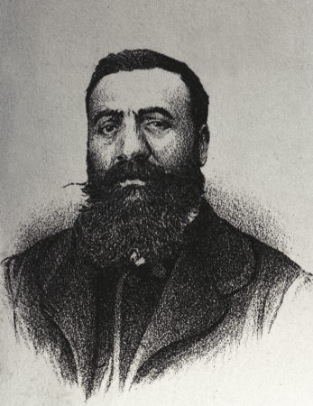 Griechischer Politiker, 19. Jahrhundert